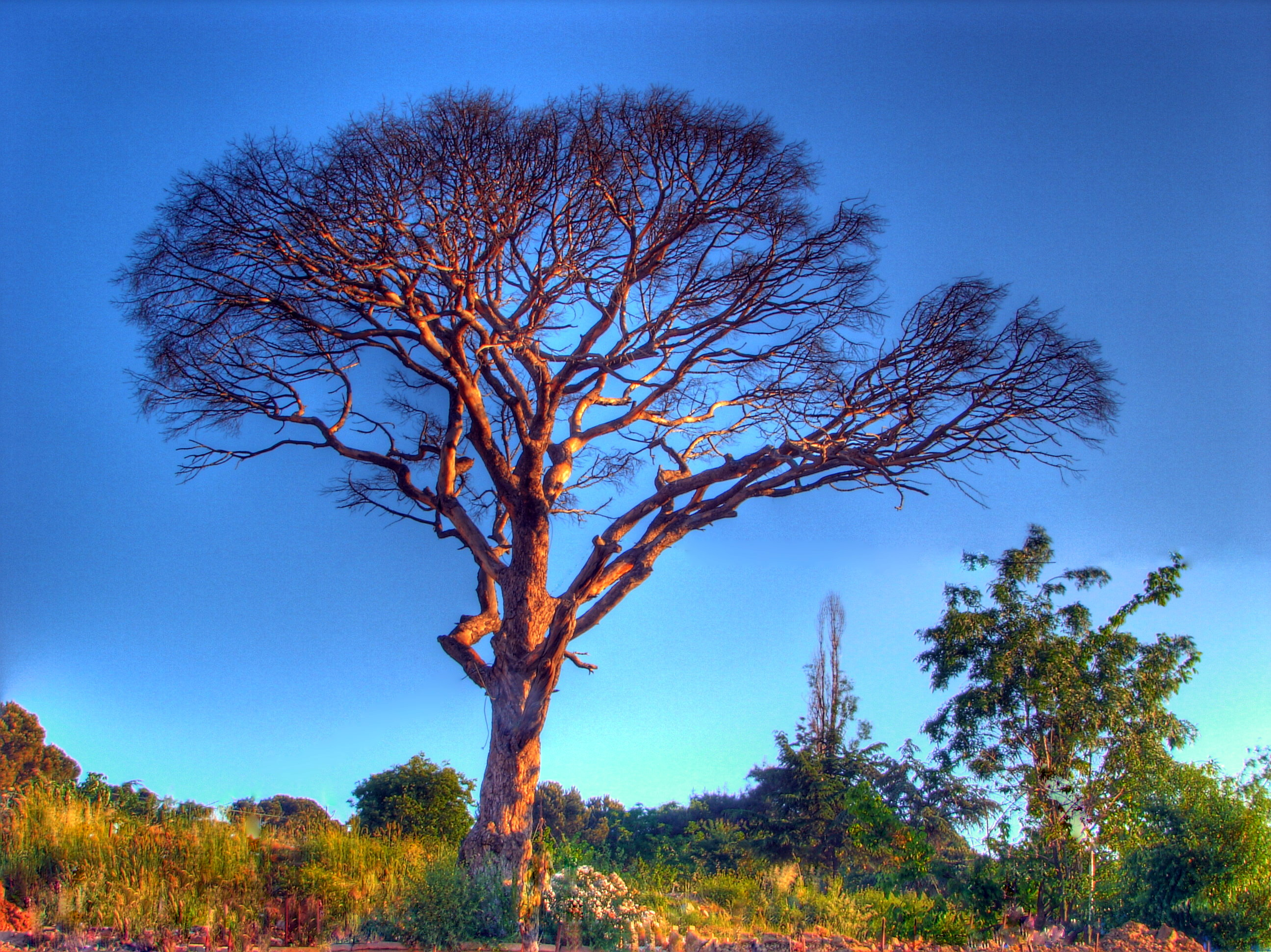 Tree at Küçük Çamlıca, Istanbul